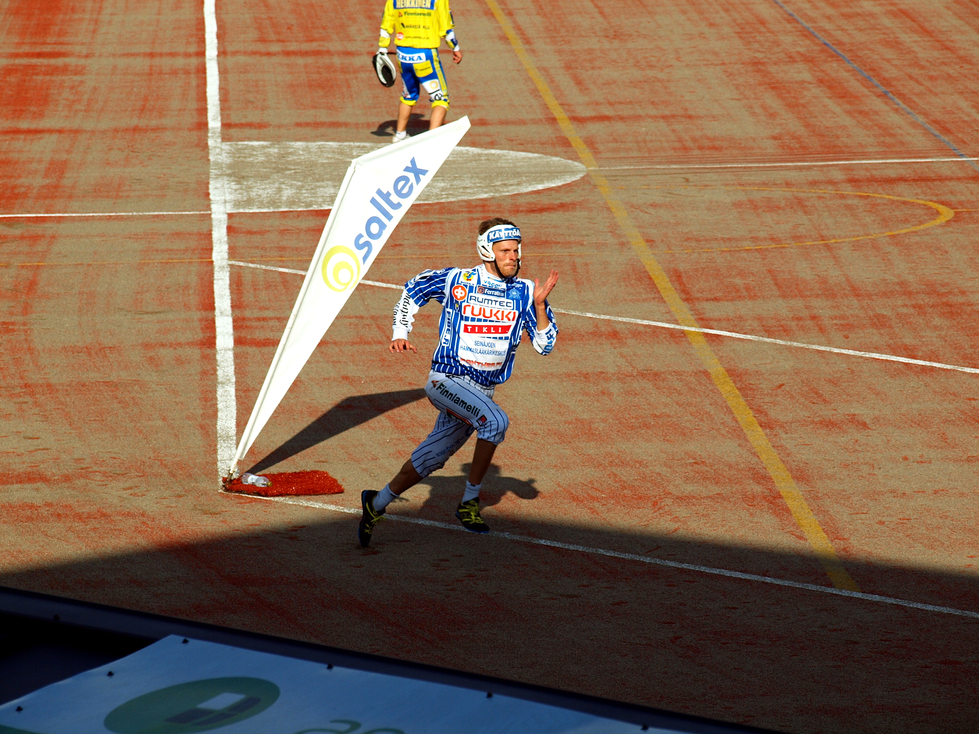 Alajärven Ankkurit - Vimpelin Veto pesäpallo-ottelu 10.8.2014. Kuvassa juoksee Perttu Hautala.